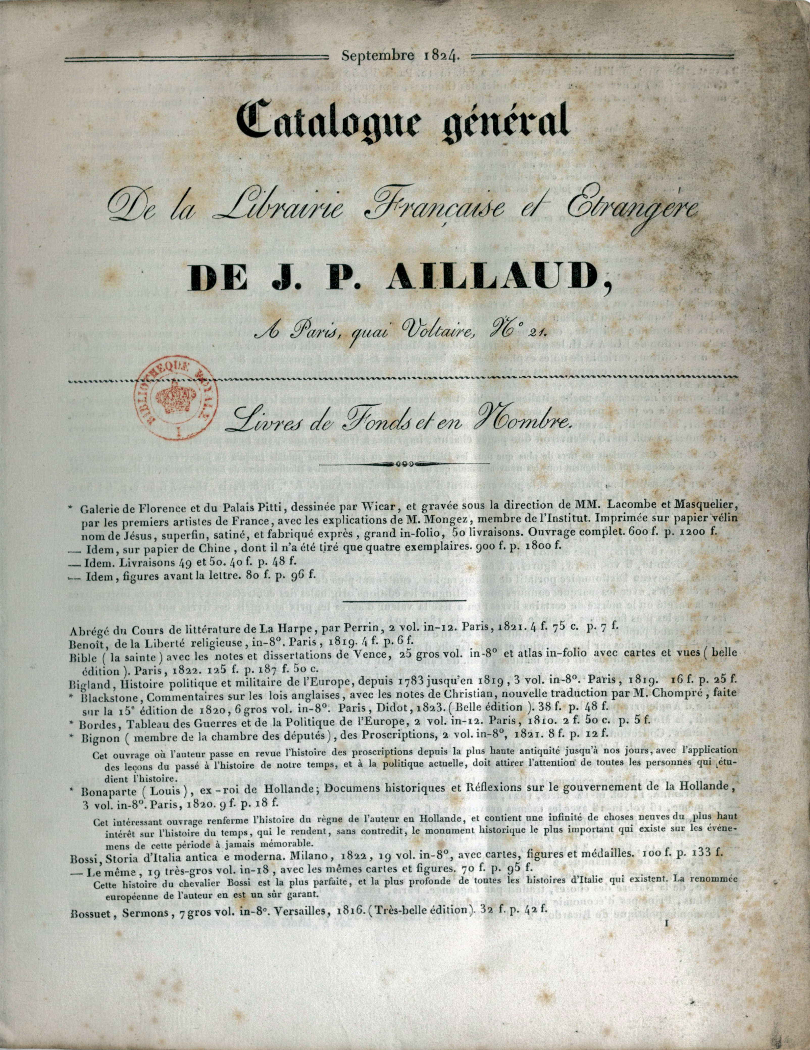 Page 1.